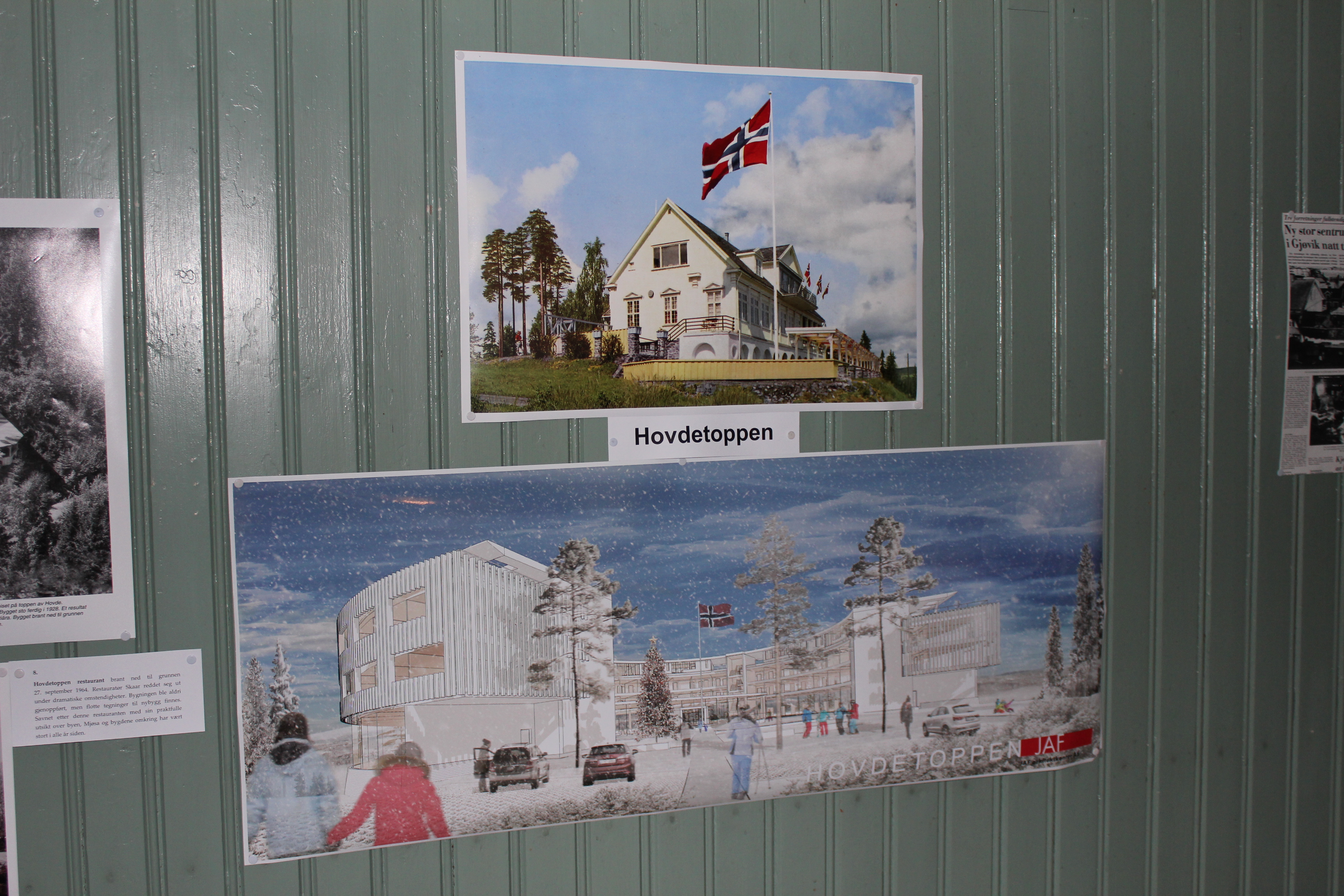 Gammel restaurant på Hovdetoppen og forslag til ny. For å finansiere infrastrukturen er det foreslått å legge ut et større areal av friarealene i solhellinga nedunder Hovdetoppen til "kremtomter". Det nye forslaget bryter sterkt med tidligere Hovdetoppen restaurant, både i omfang og stil, og vil framstå som en ufolignende modernistisk struktur.